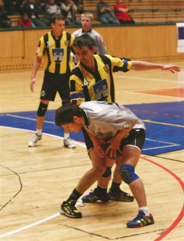 Narodni Hazena - Zaloznik